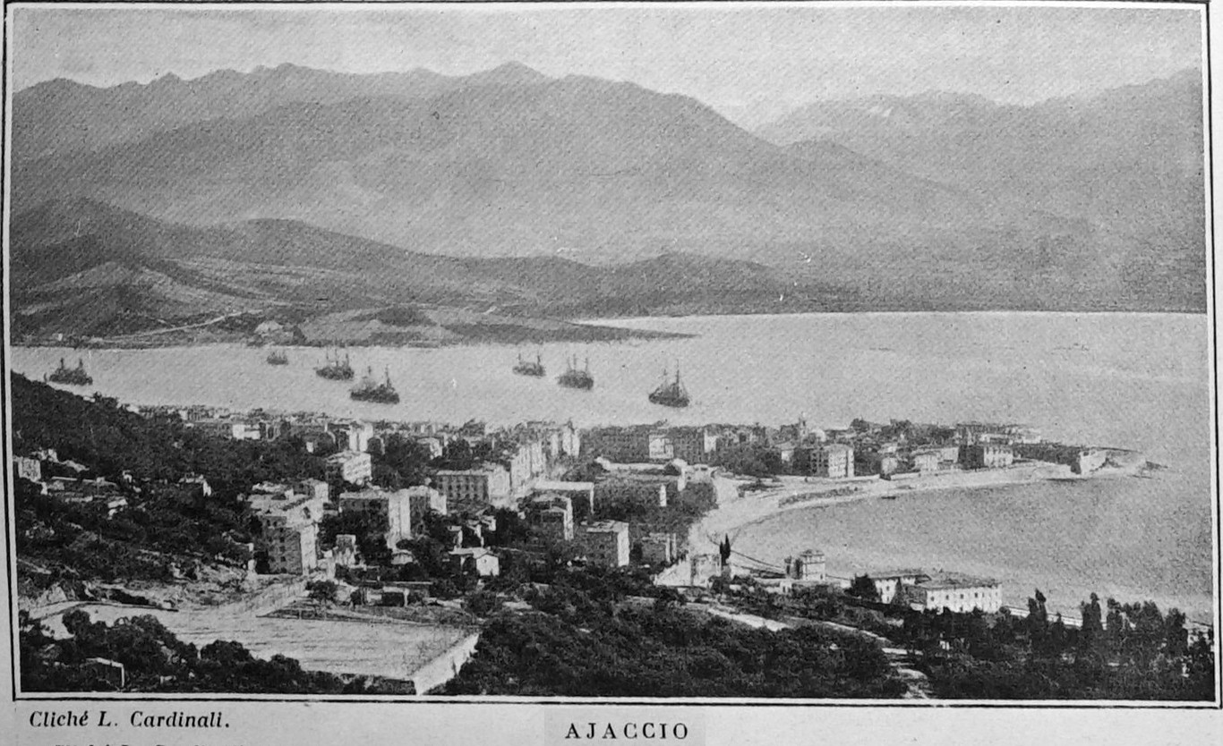 publié dans le "Bulletin de l'œuvre des voyages scolaires".